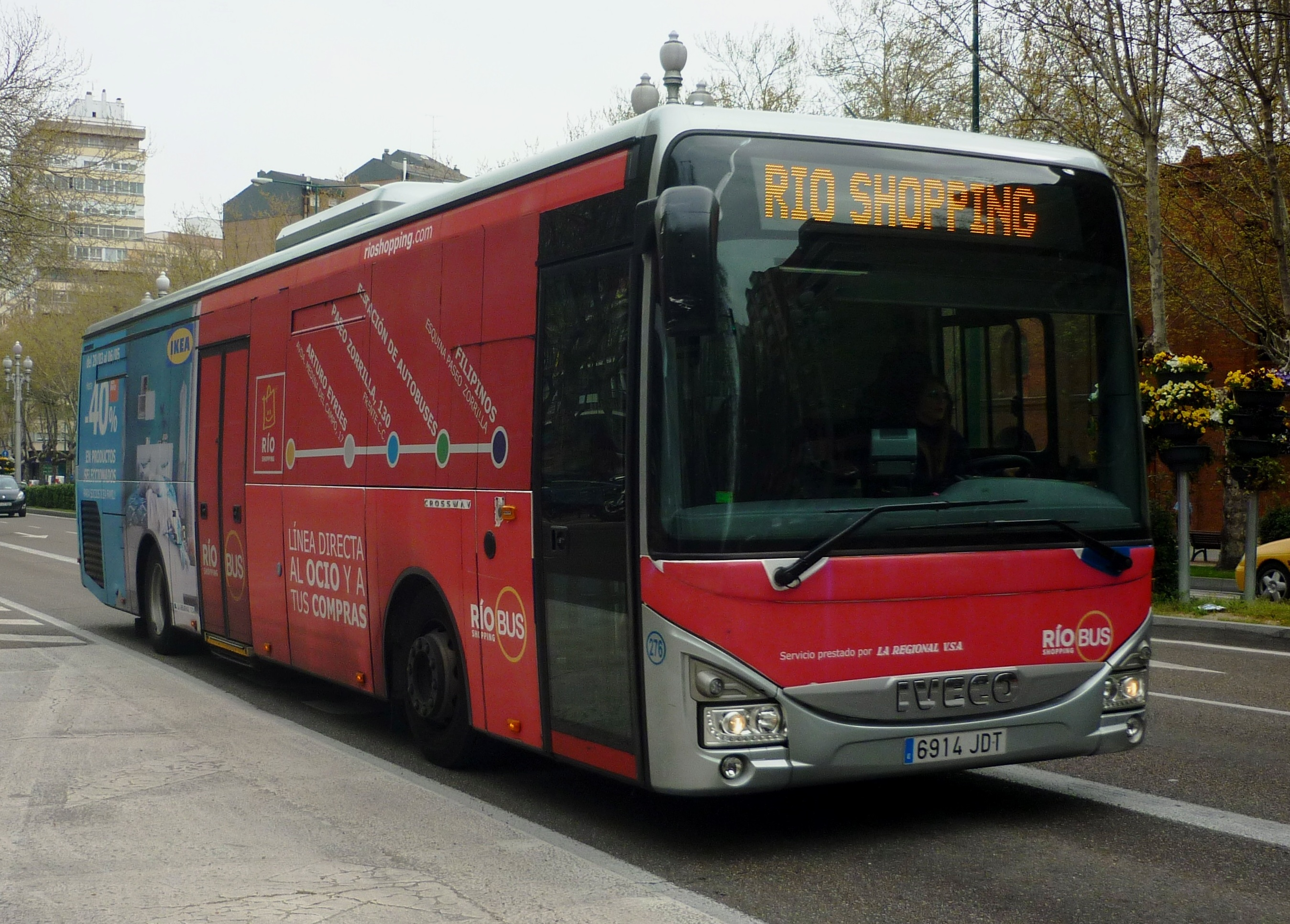 276_LaRegional